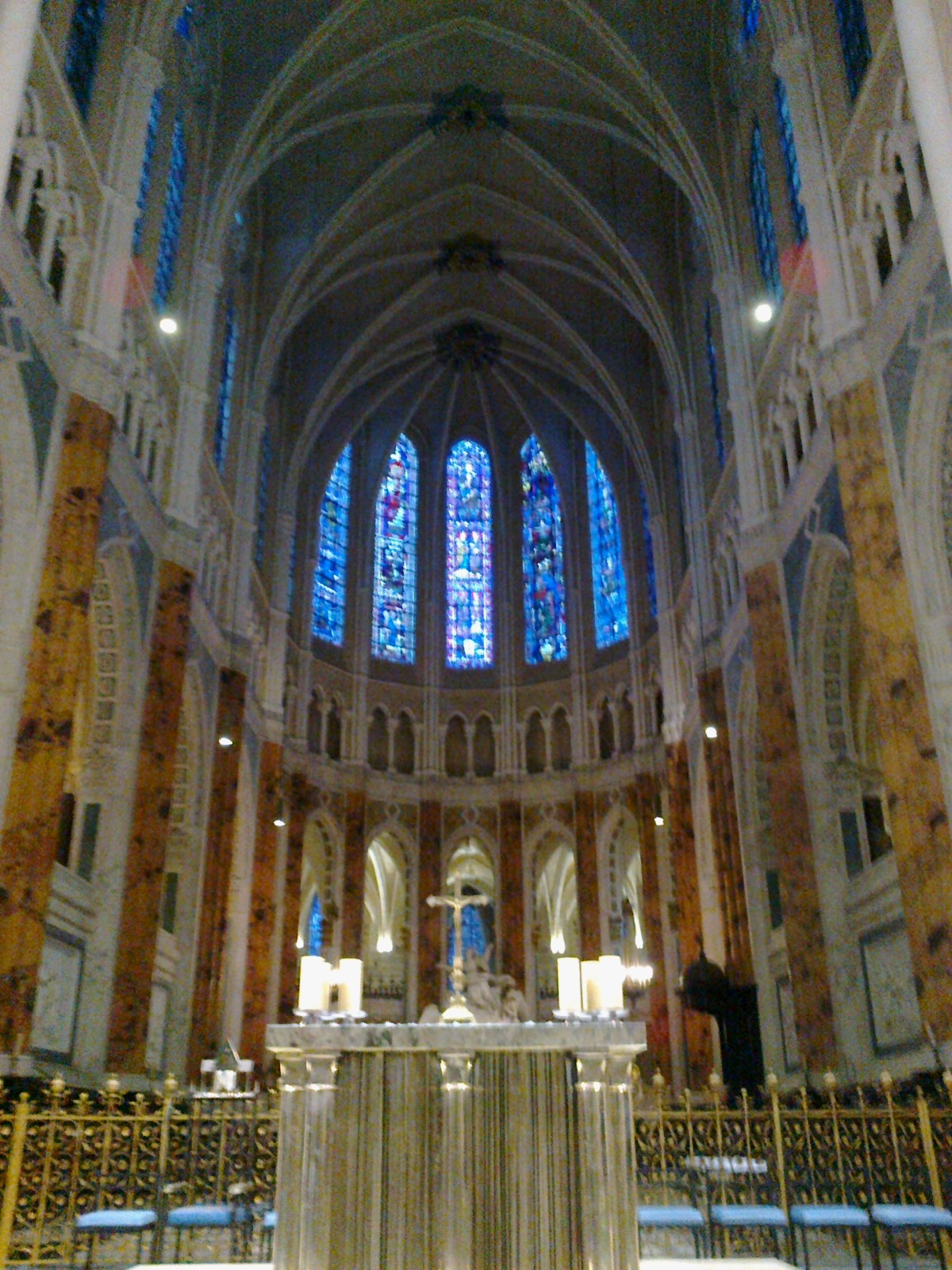 Eure-Et-Loir Chartres Cathedrale Choeur 29112014